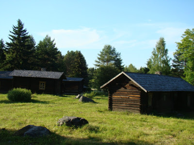 Torppia